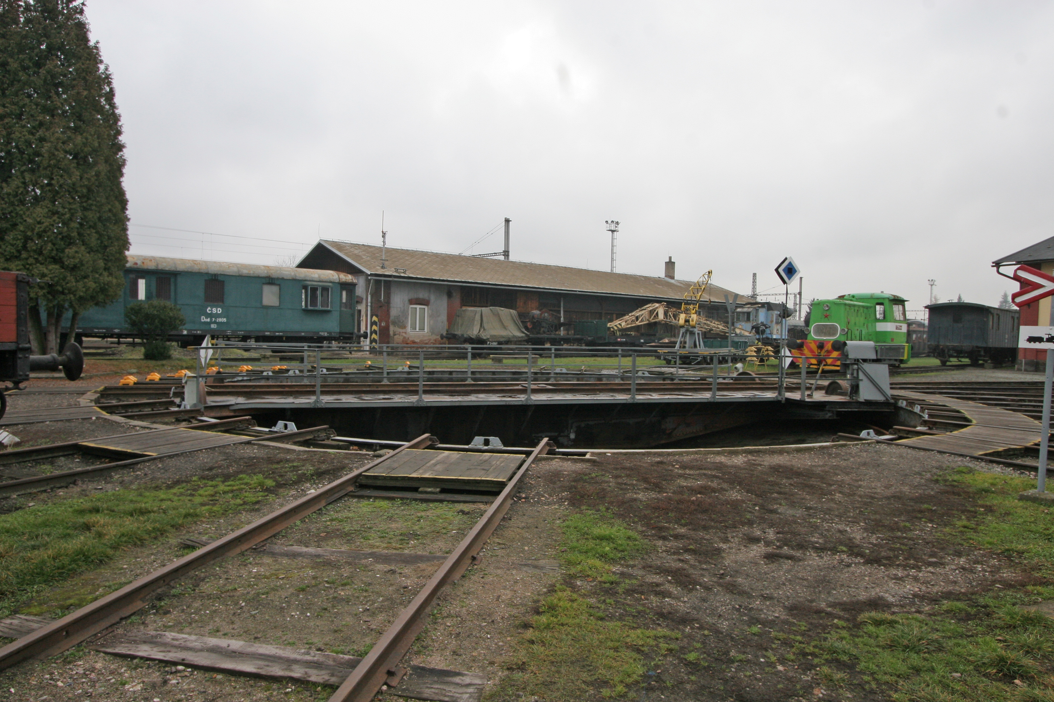 Nádraží Jaroměř - výtopna s točnou, Jaroměř-Pražské Předměstí, Nádražní 222